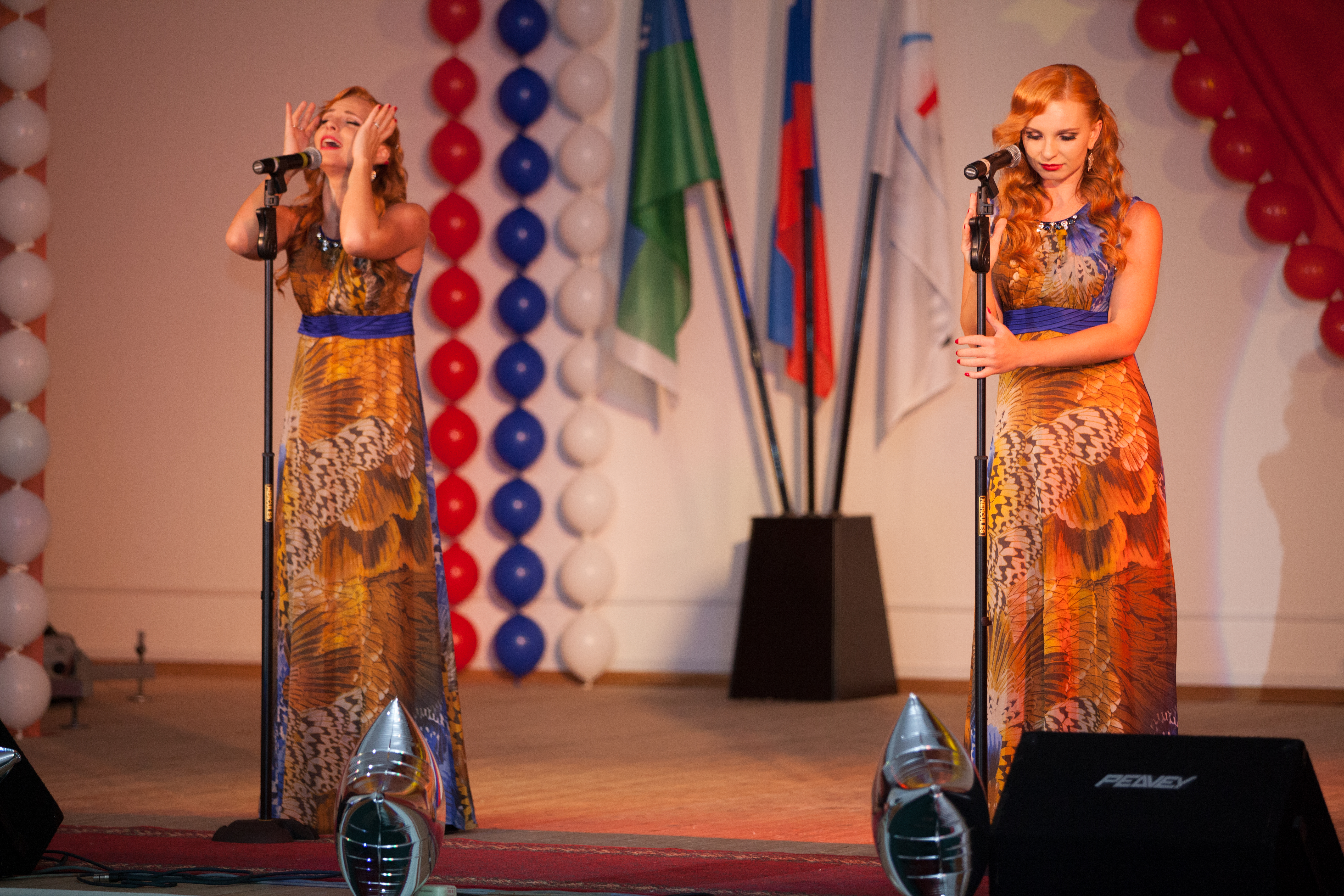 выступление Анны-Марии в г. Радужный (Россия)